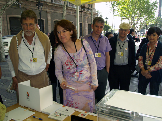 Autor: Salvador Badiella